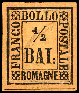 Первая почтовая марка Романьи